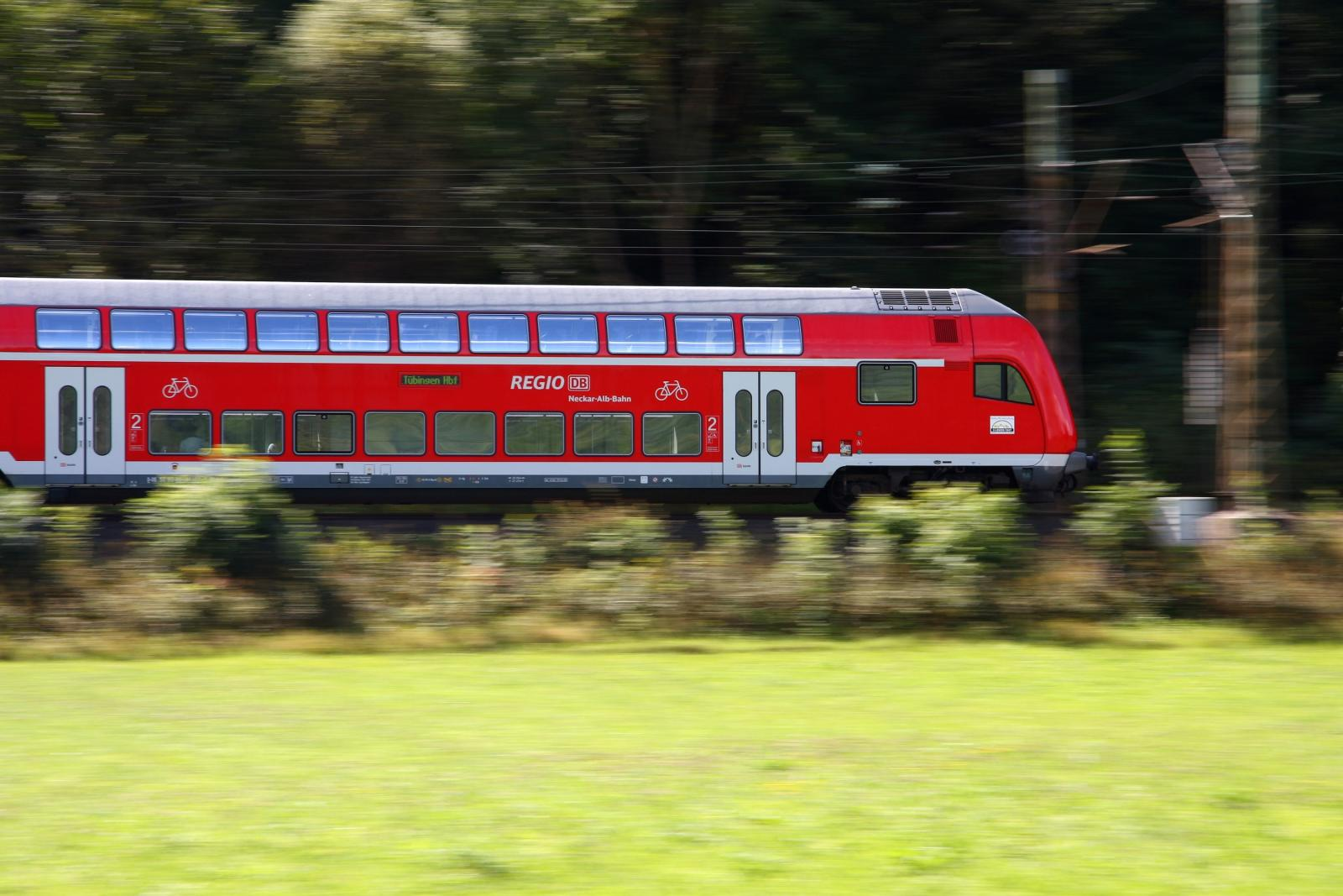 Doppelstock-Steuerwagen auf der Neckar-Alb-Bahn bei Kirchentellinsfurt August 2009